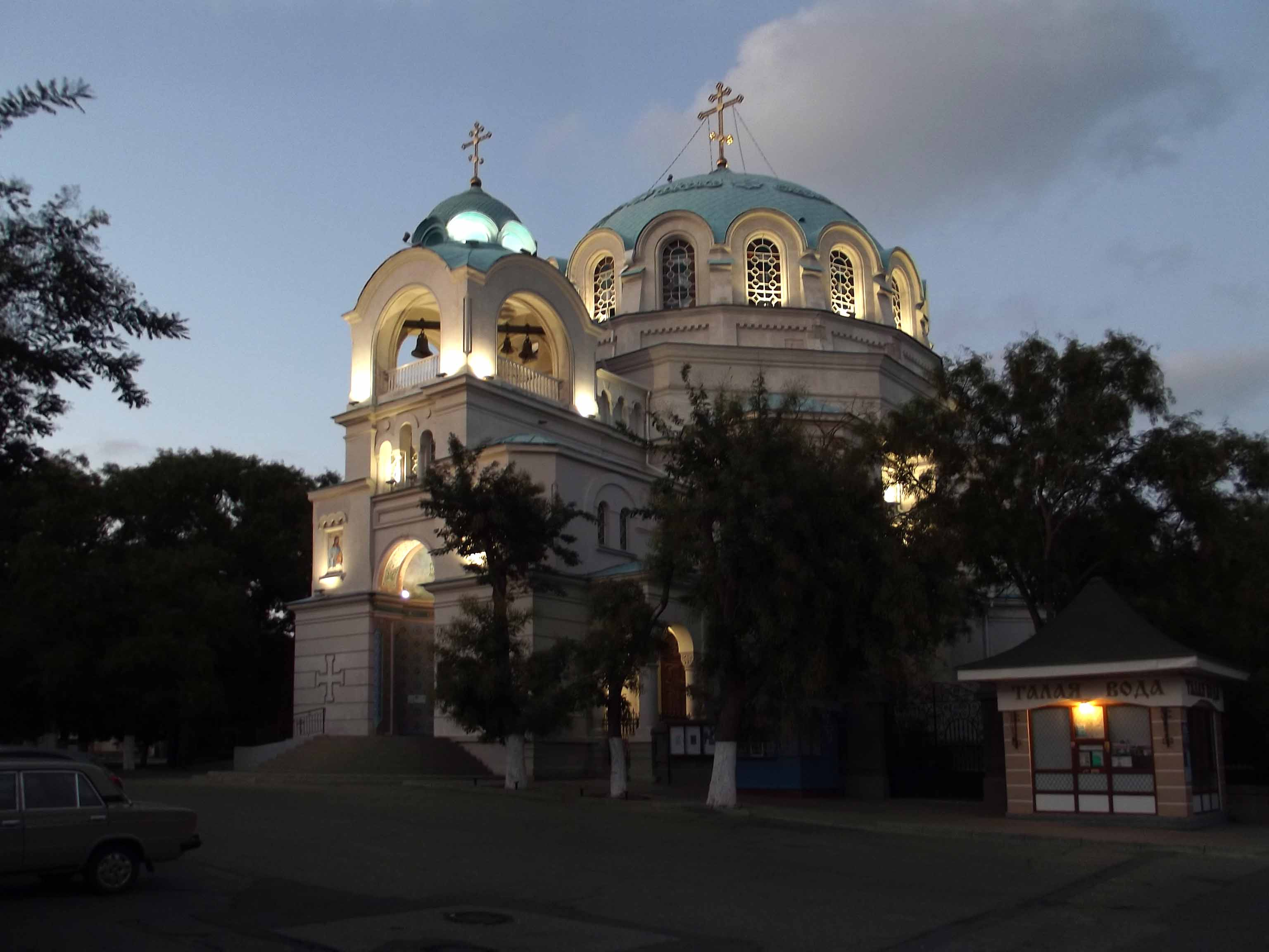 Свято-Николаевский собор вечером